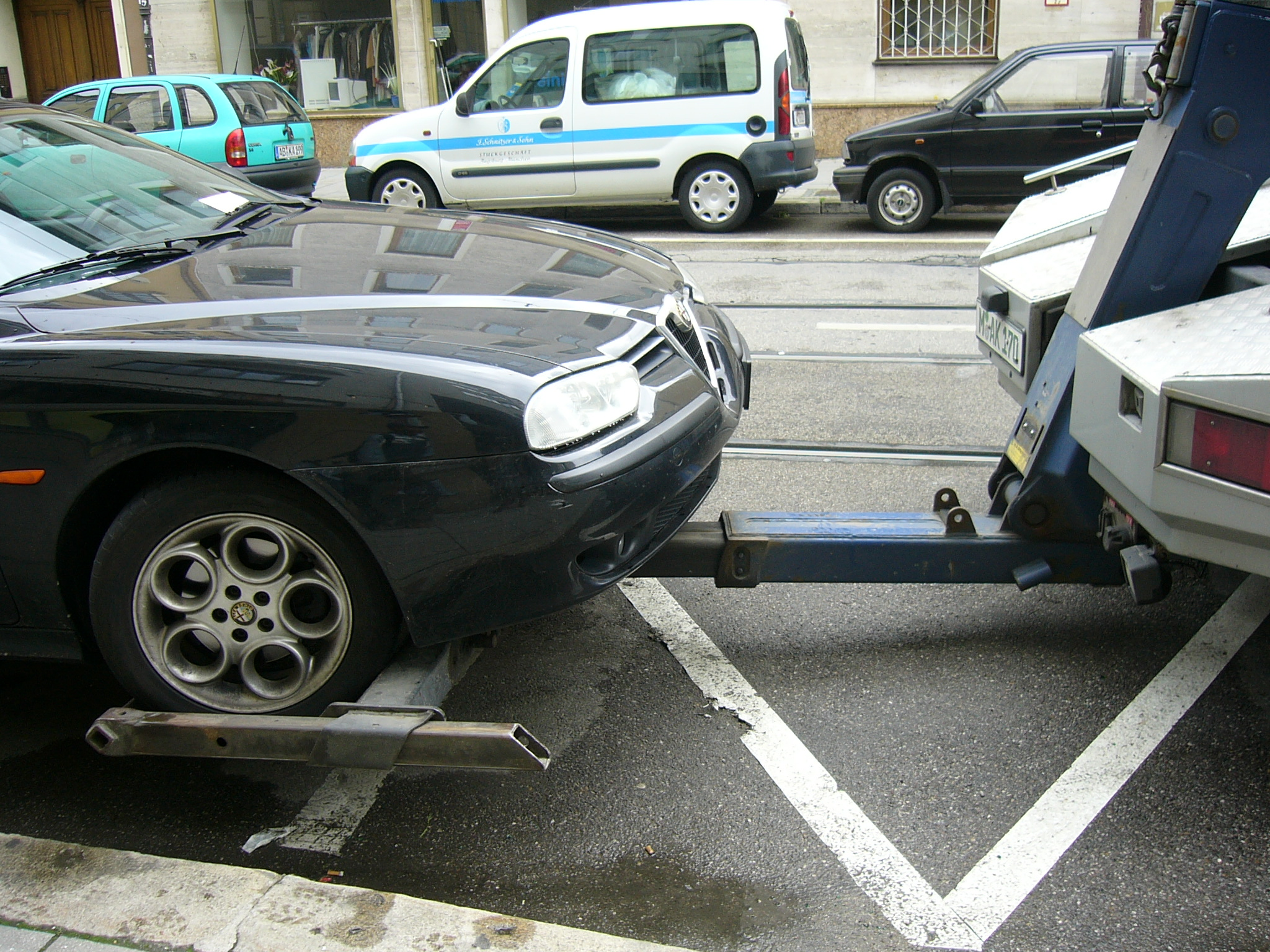 Abschleppbrille